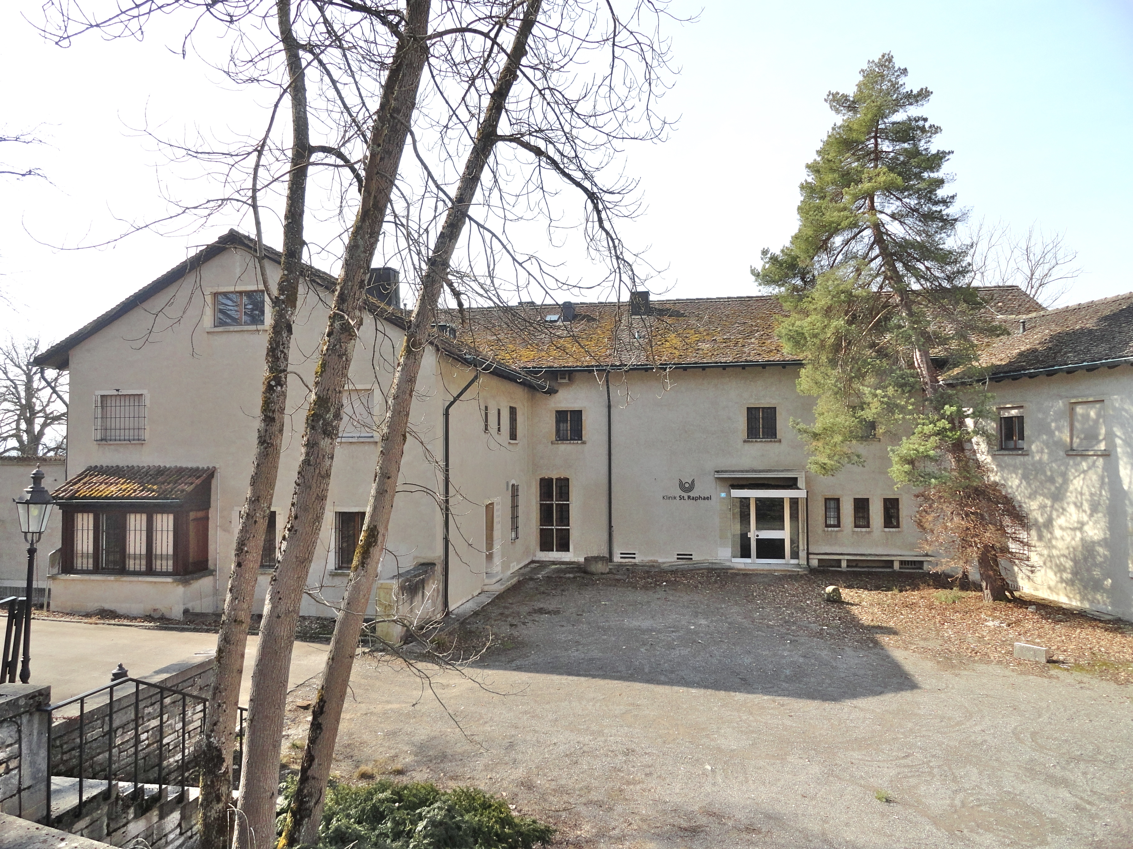 ehemalige Klinik St.Raphael (Küsnacht)